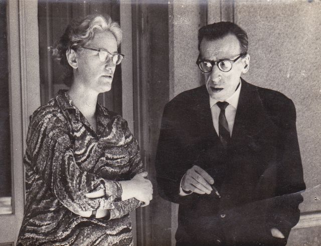 En la Facultad de Humanidades y Ciencias, Montevideo,1969.